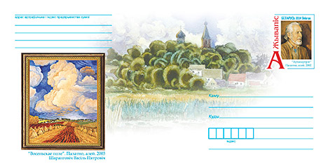 Конверт с оригинальной маркой «Живопись. В. П. Шарангович». Художник конверта - Елена Медведь. Марка - «Автопортрет». Холст, масло. 2002 — на бел. языке, репродукция картины В. П. Шаранговича. Иллюстрация - «Осеннее поле». Холст, масло. 2003 — на бел. языке, репродукции картин В. П. Шаранговича «Осеннее поле» (холст, масло, 2003), «Гроза прошла» (бумага, акварель, 2005).